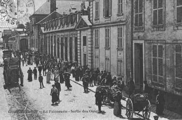 Faïencerie Boulenger à Choisy-le-Roi, France, vers 1910, sortie des ouvriers